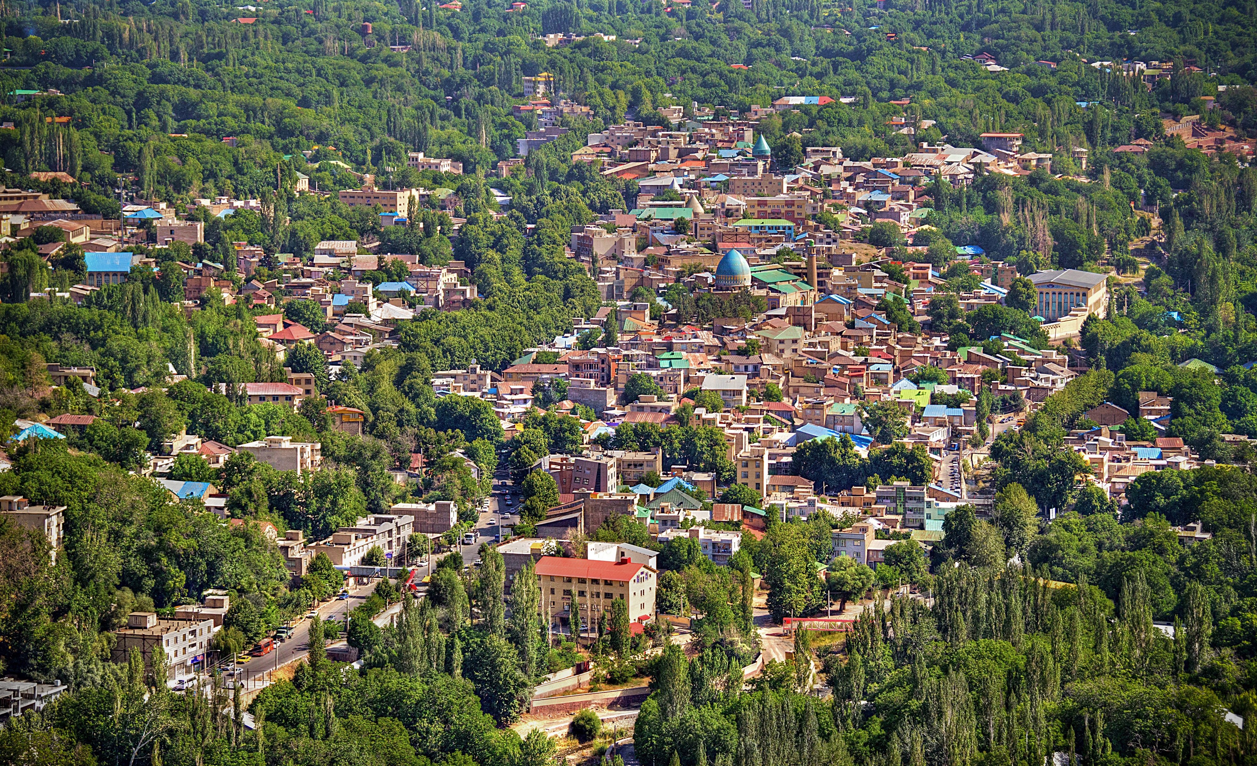 شهر دماوند